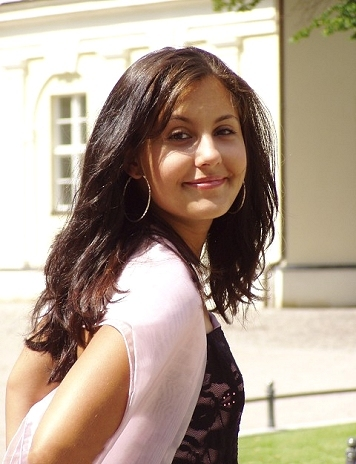 Judith Burmeister